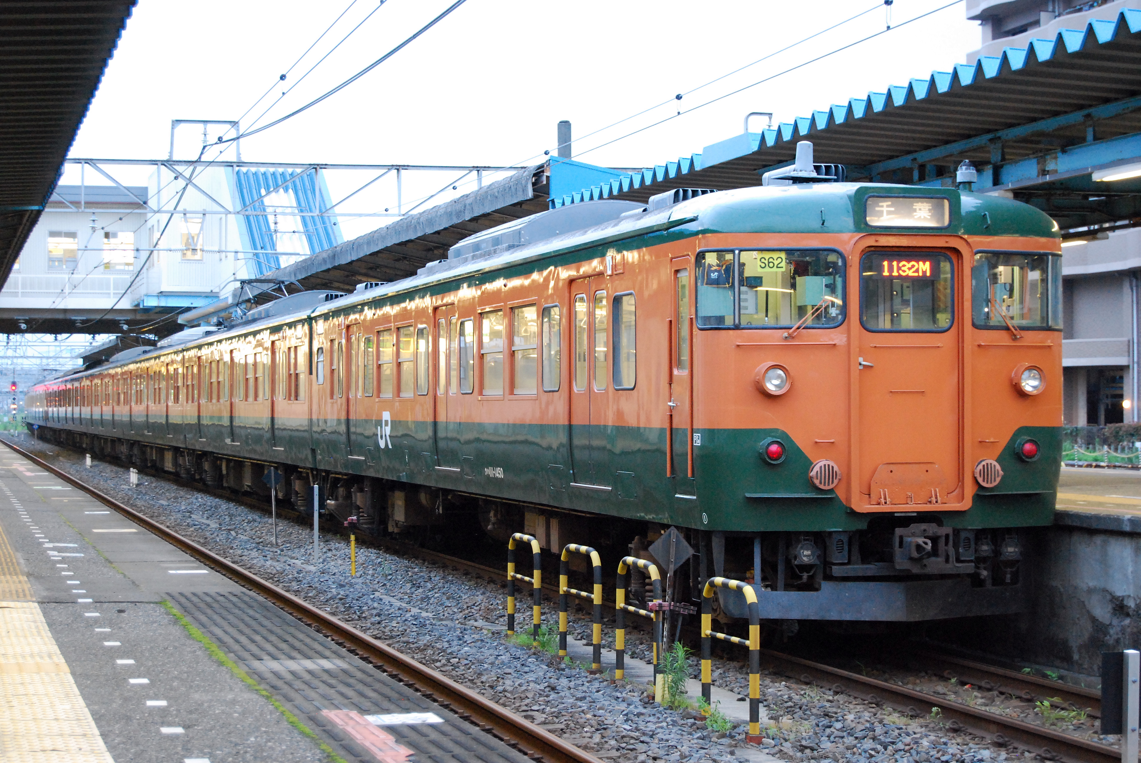 内房線君津駅で停車中の幕張車両センター所属の湘南色113系